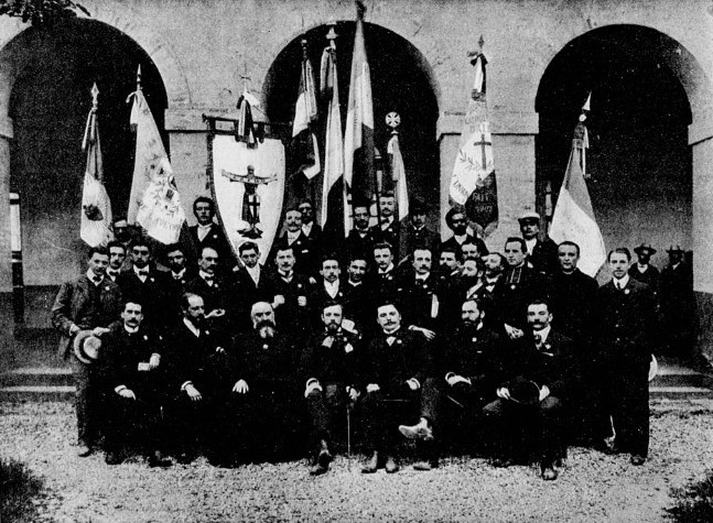 "Le Comité général et les délégués des provinces".